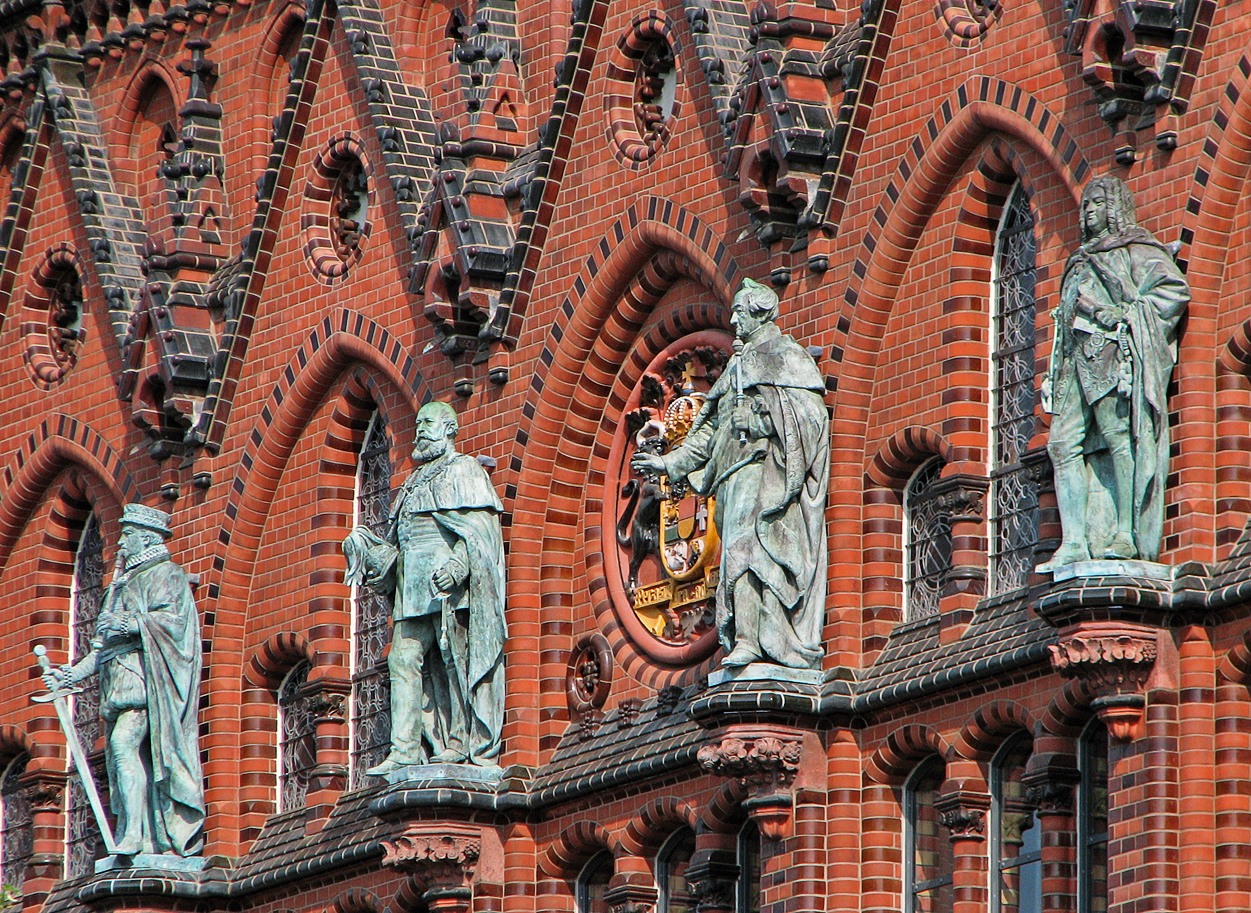 Dieses Bild zeigt die 4 Figuren der Front des Ständehauses in Rostock. Die 4 Standbilder zeigen die (Groß-)Herzöge in Kupfertreibarbeit von den Bildhauern Ludwig Brunow und Oskar Rassau: Herzog Johann Albrecht I. Herzog Christian Ludwig II. Großherzog Friedrich Franz II. Großherzog Georg v. Mecklenburg-Strelitz